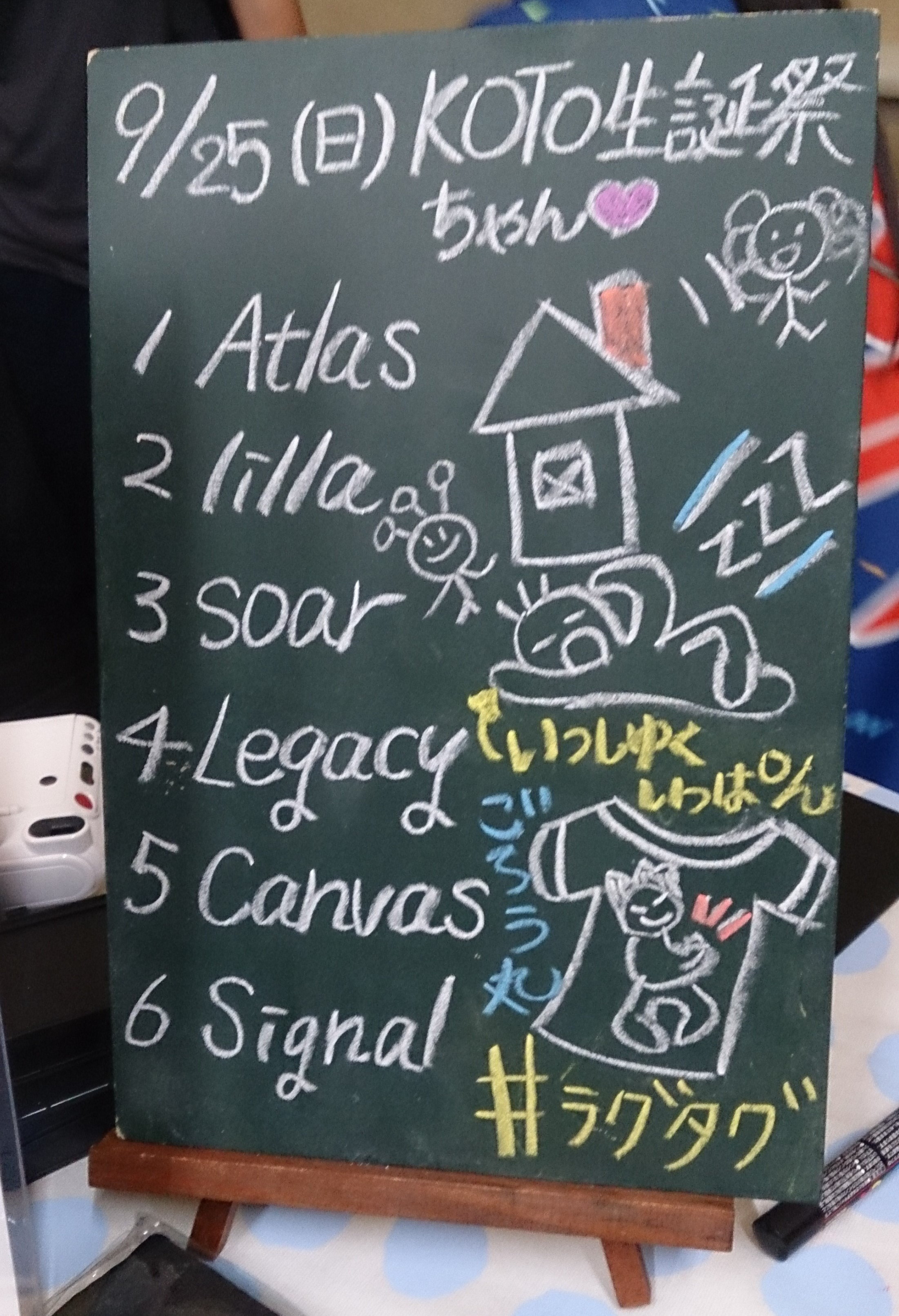 amiinAセトリボード(20160925(1))